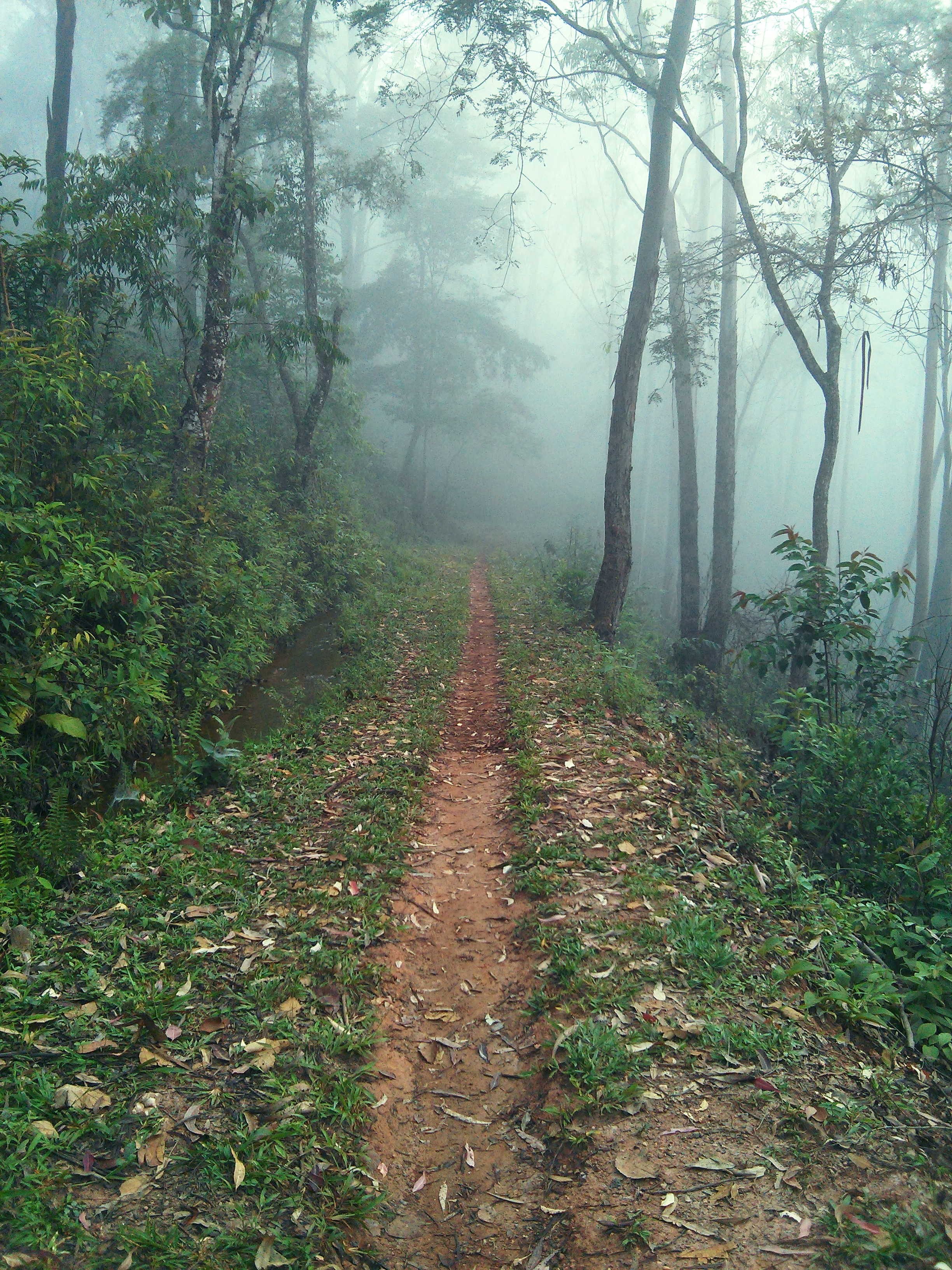 Caminhada pela trilha da banqueta.